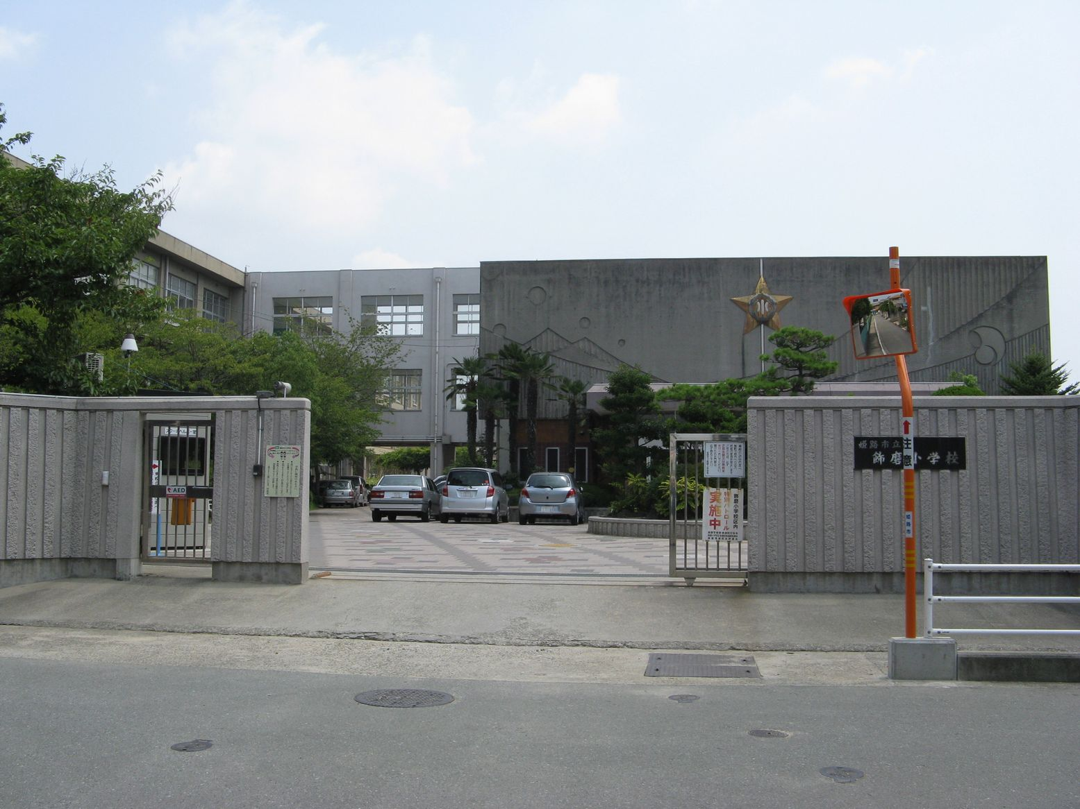 姫路市立飾磨小学校